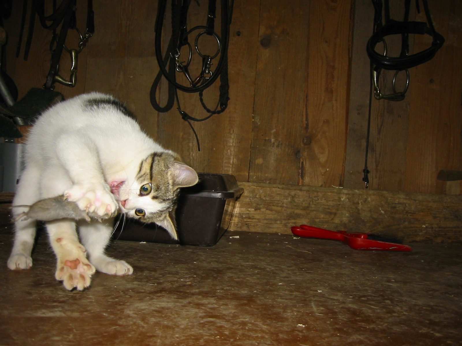 Hauskatze spielt mir der gefangenen Beute, in diesem Fall einer Maus.